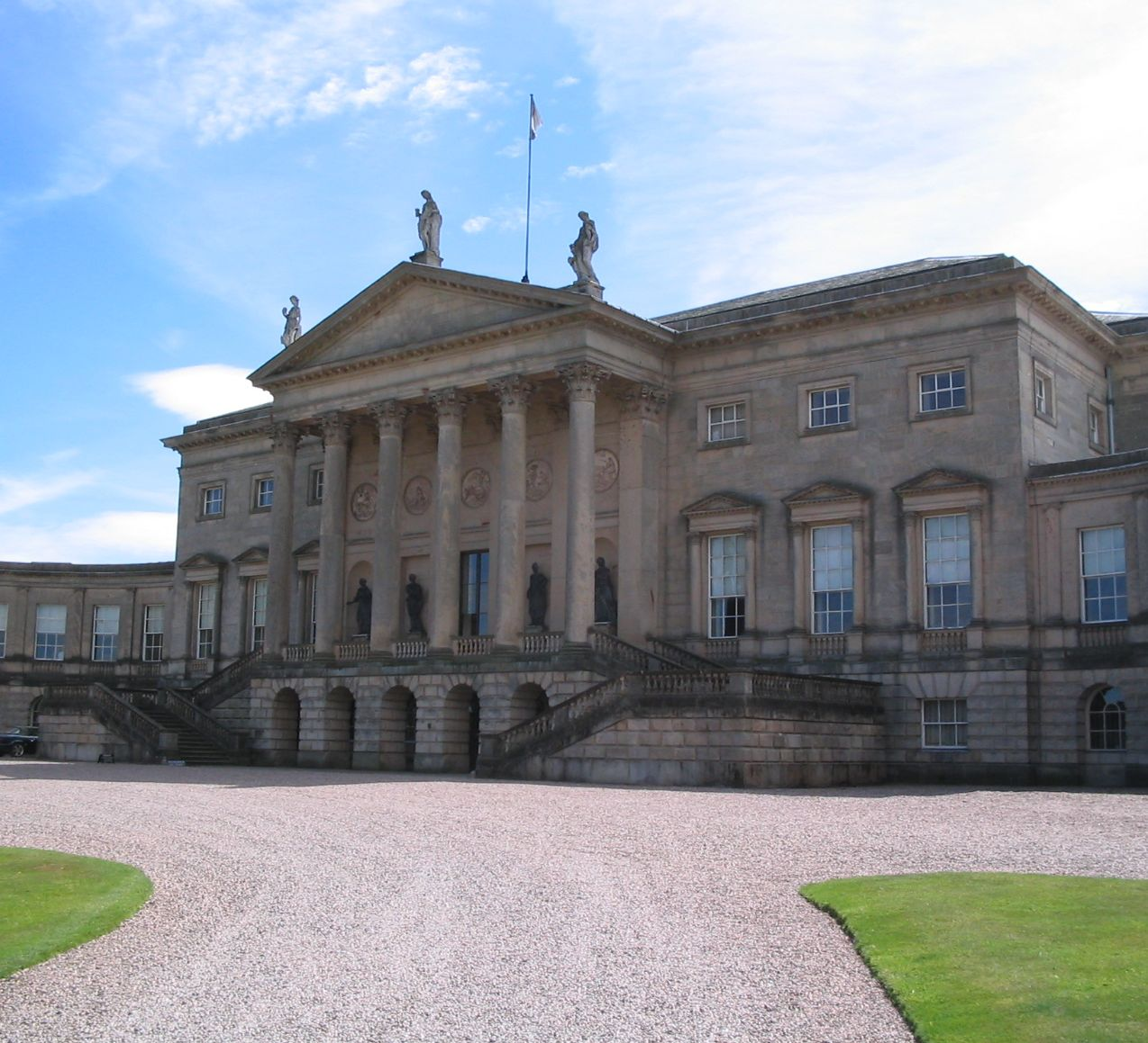 Kedleston Hall